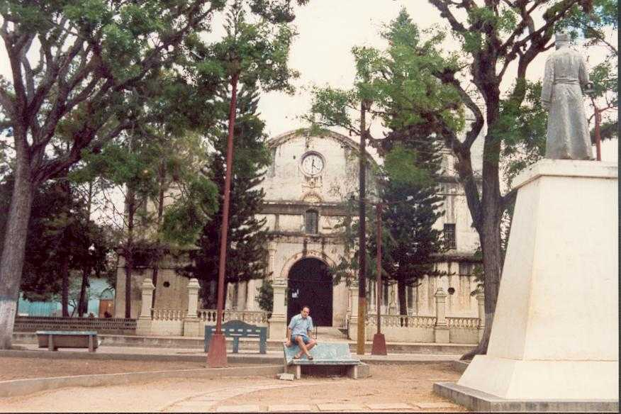 Parque e iglesia de Ocotal, Nueva Segovia, Nicaragua, America Central en 1988. actualmente restaurado y considerado el mejor de Nicaragua.